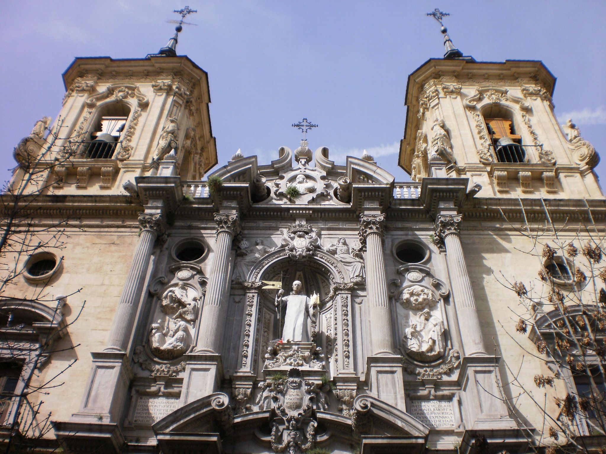 Basilica-Hospital of San Juan de Dios, Granada